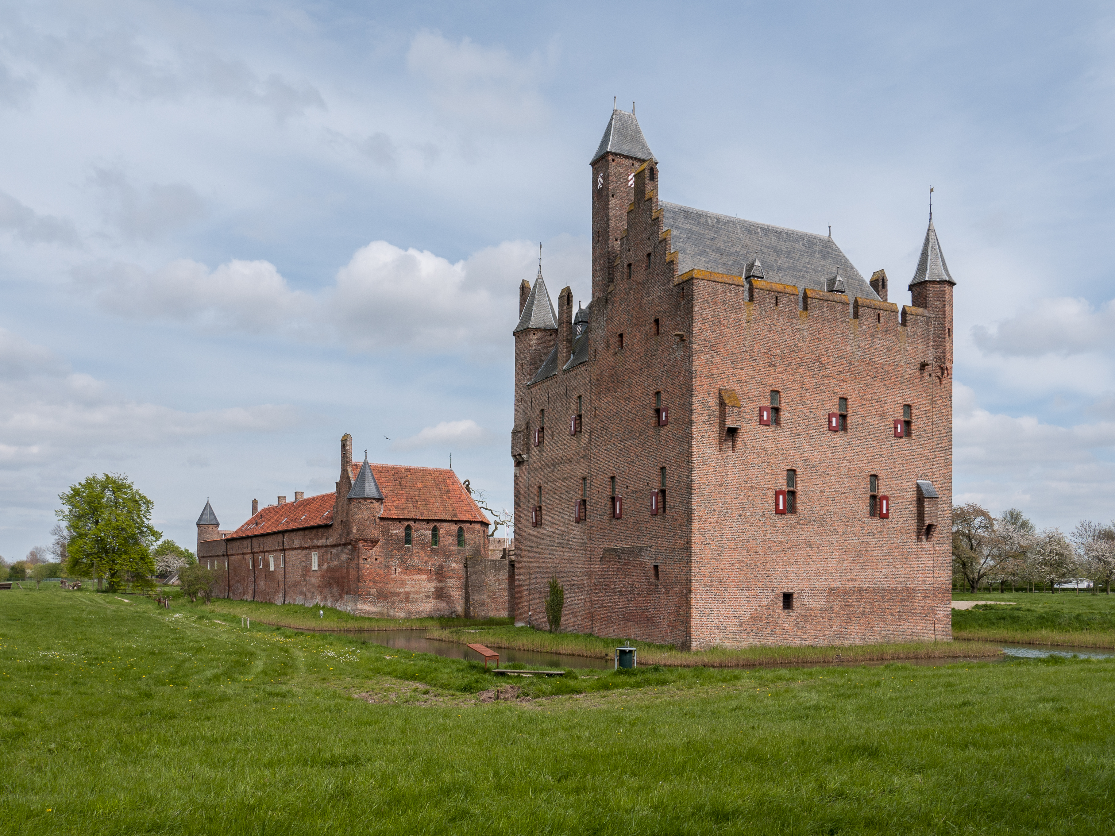 Die Burg liegt im Osten von Betuwe in der Mitte von Geldernland in den Niederlanden.